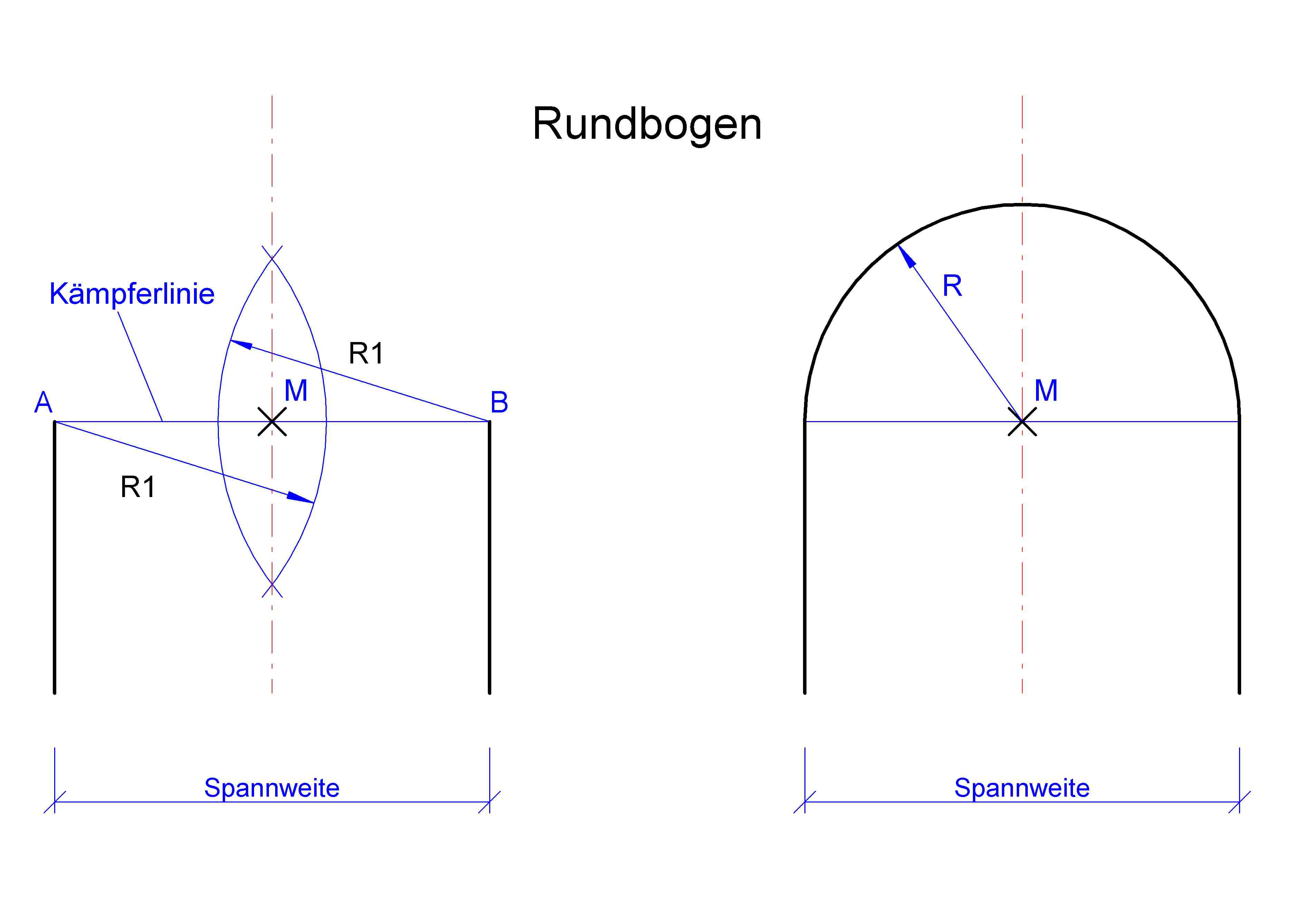 Konstruktion Rundbogen